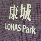 中文（香港）: 康城站